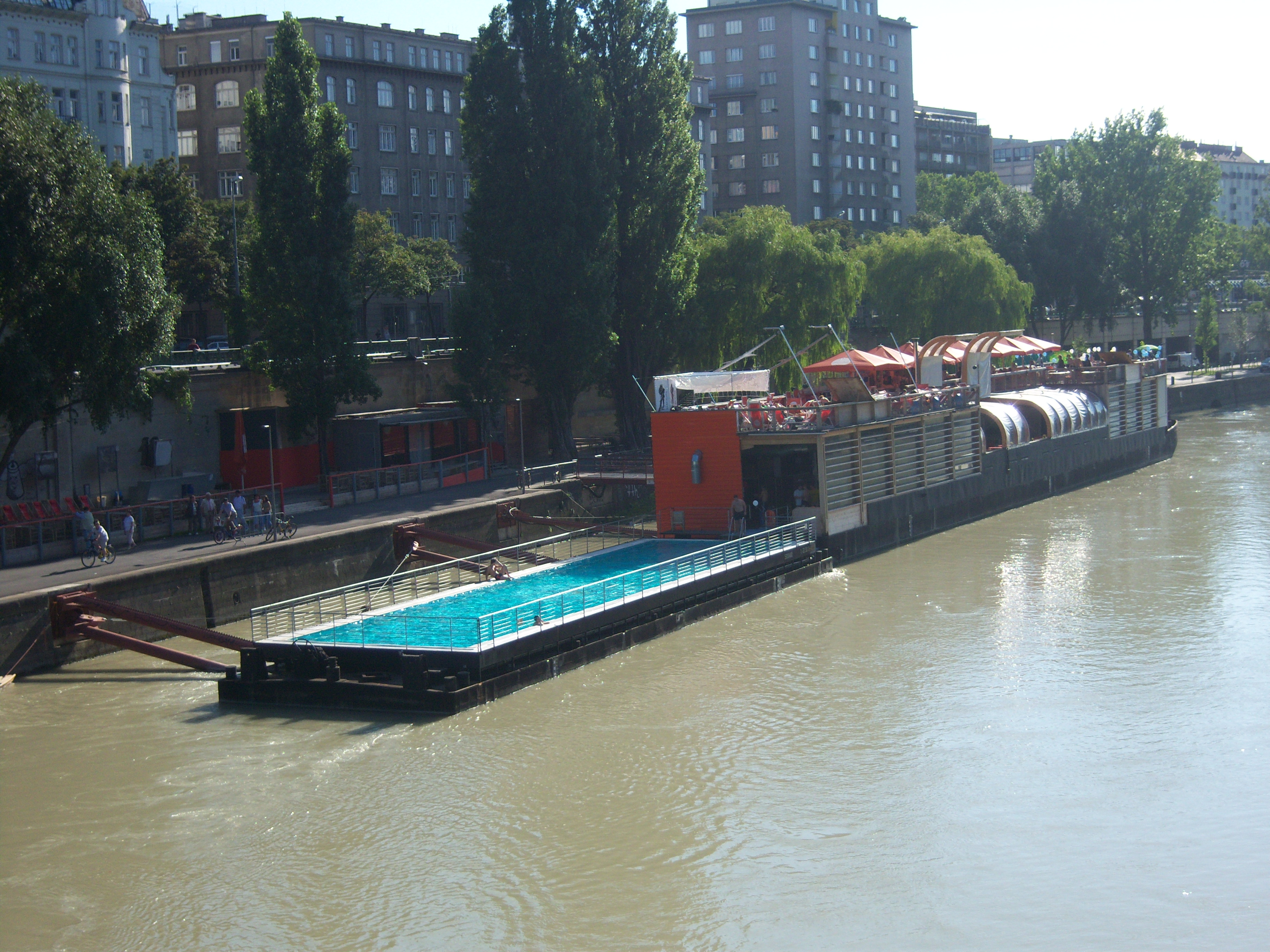 Badeschiff Wien im Donaukanal